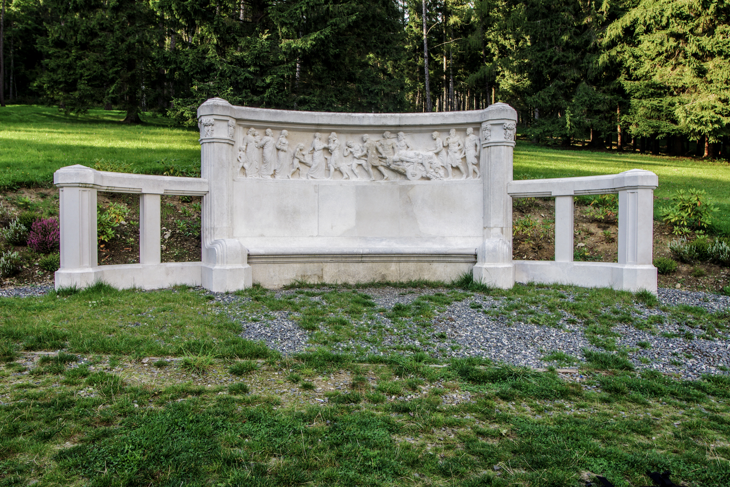 Mramorová lavice s reliéfem Návrat Germánů z lovu, Jeseník.